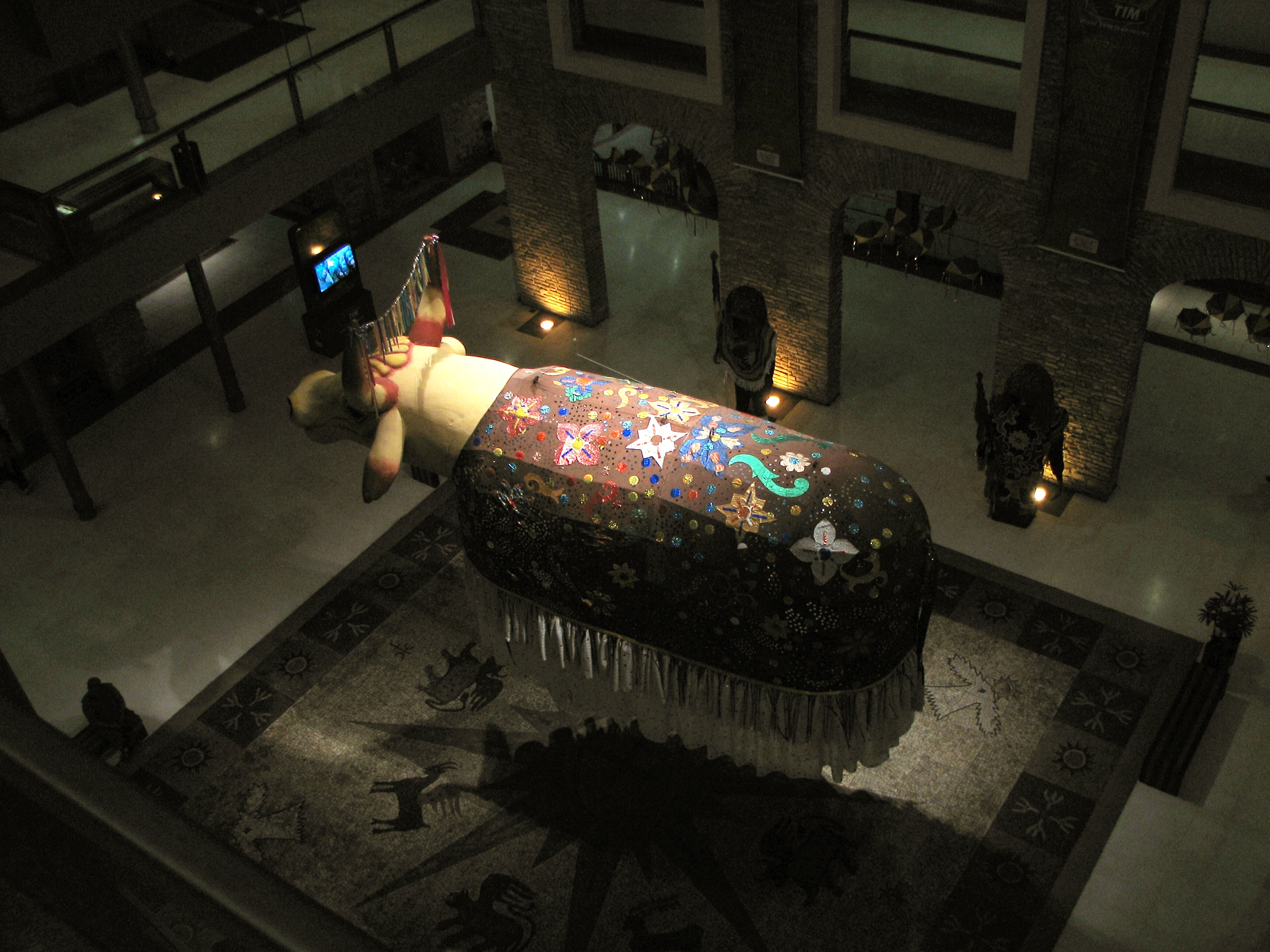 Bumba-meu-boi in the Paço Alfândega (cultural center and mall)